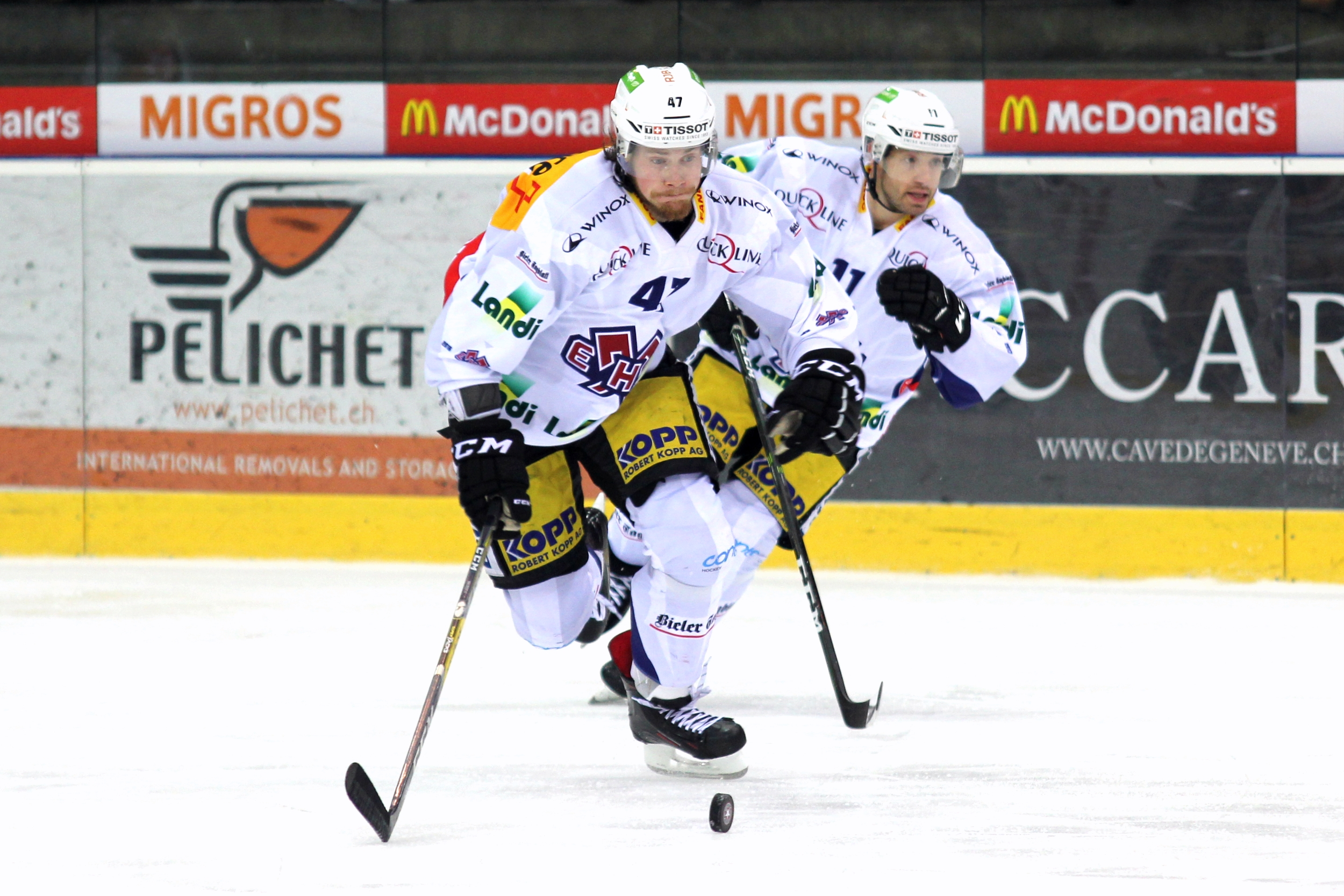 Marco Maurer (B 47), Jacob Micflikier (B 11).